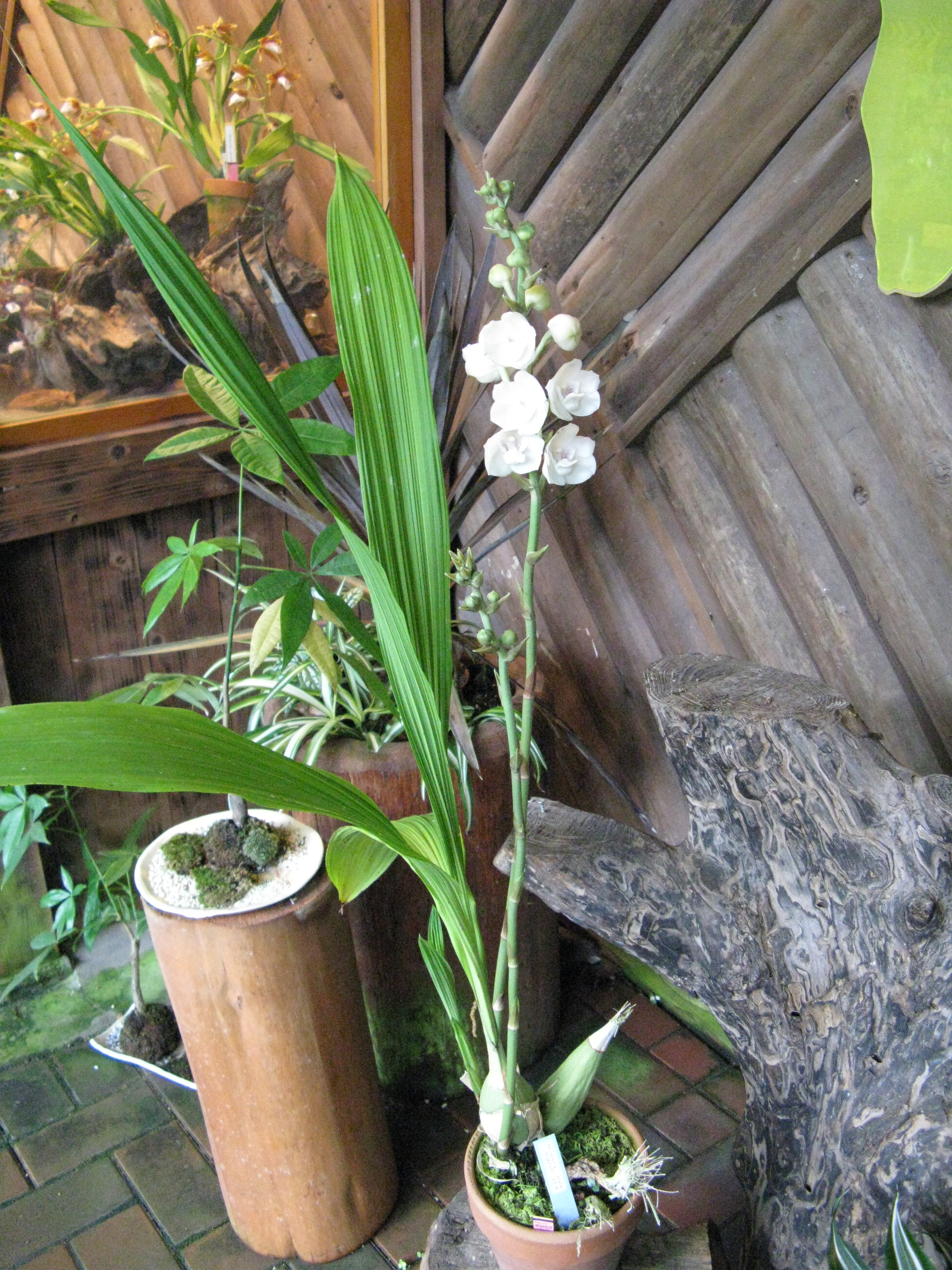 Peristeria elata Place:Osaka Prefectural Flower Garden,Osaka,Japan